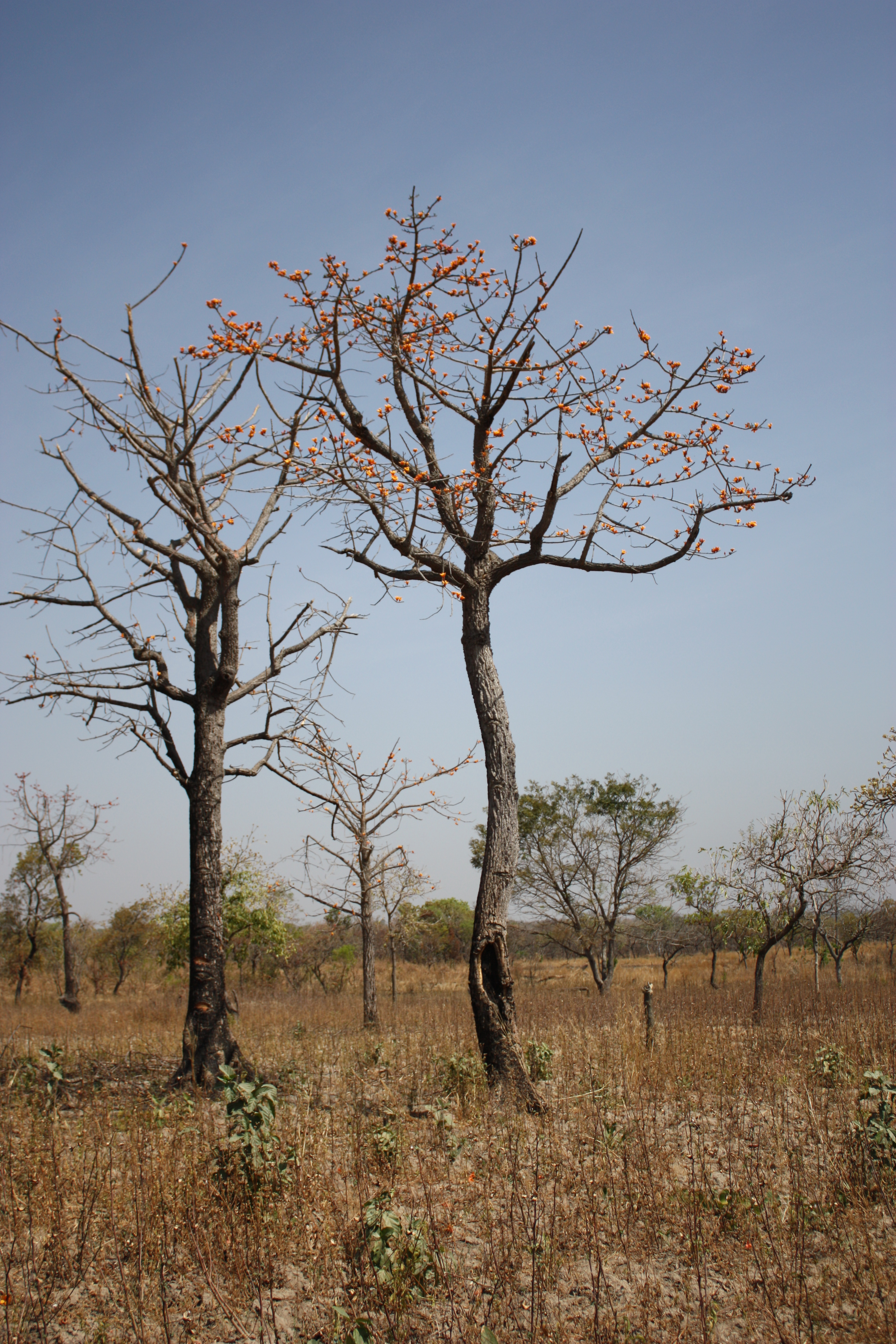 Bombax costatum, near Folonzo, SW Burkina Faso